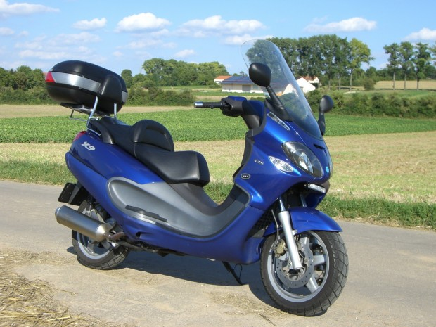 foto einer Piaggio X9